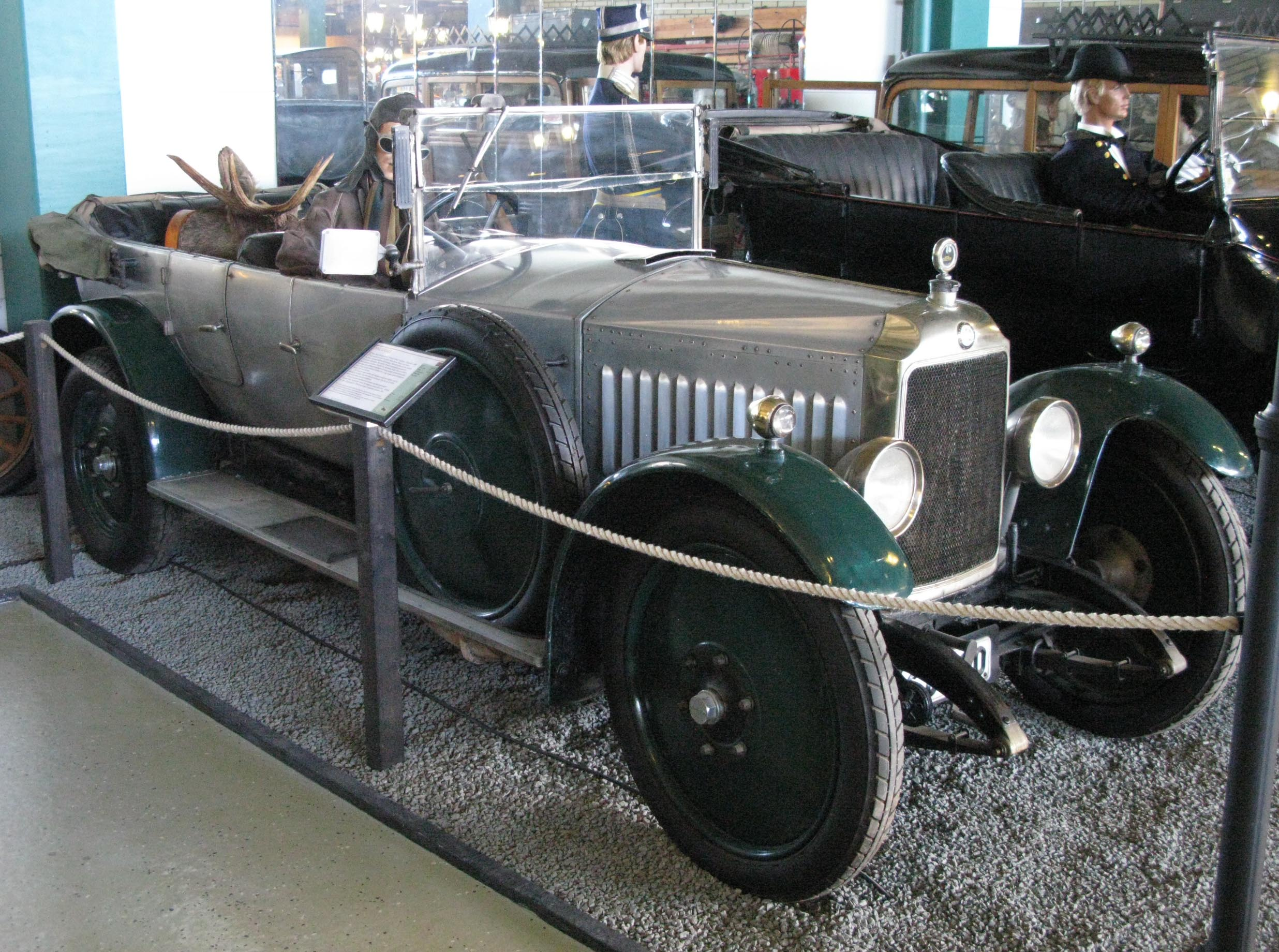 1922 Vauxhall Type M